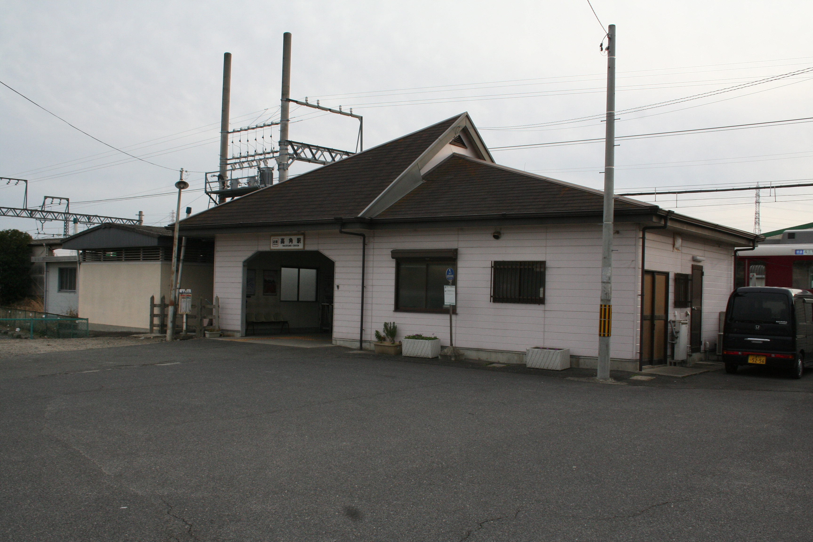 高角駅